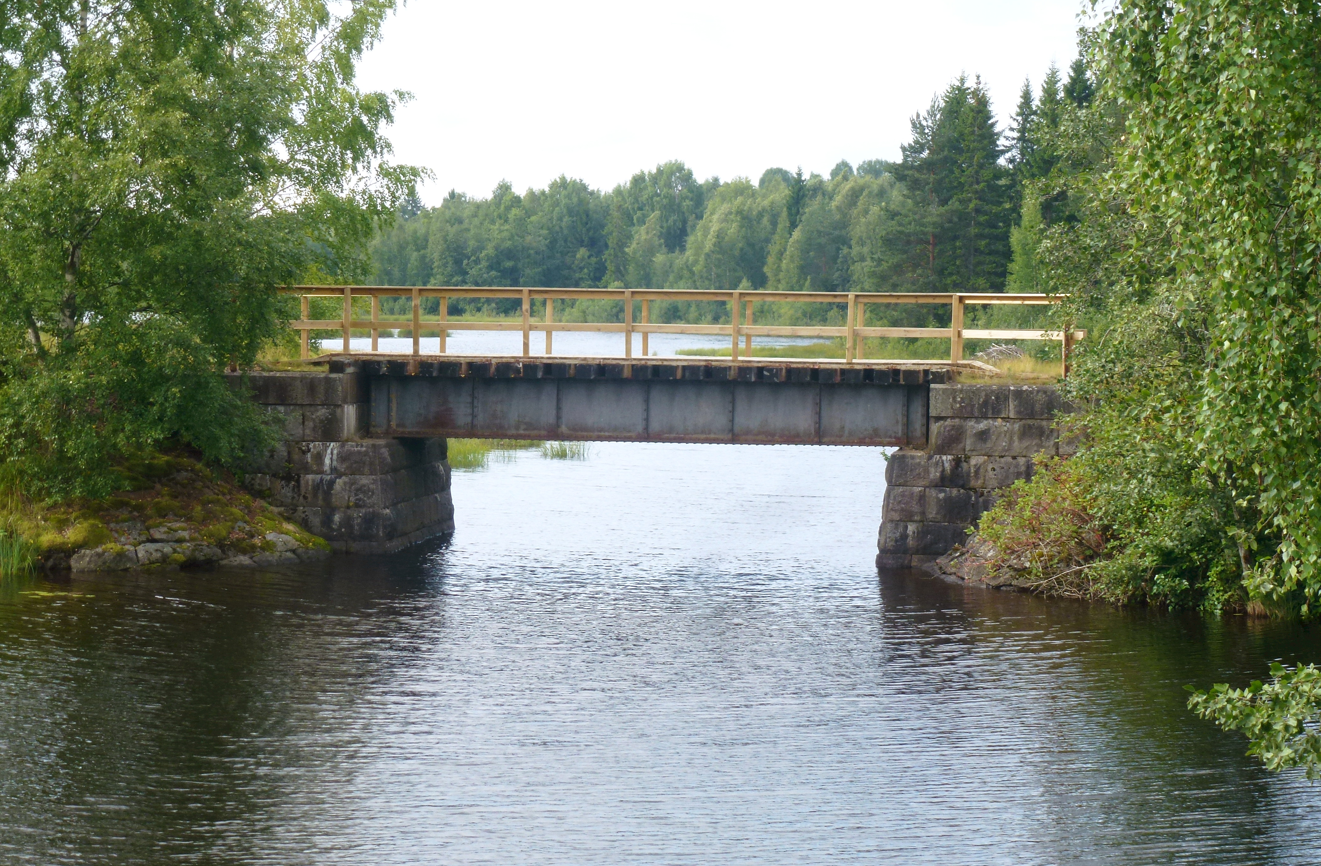 Järnvägsbron mellan sjön Saxen (närmast) och sjön Björken, Grangärde